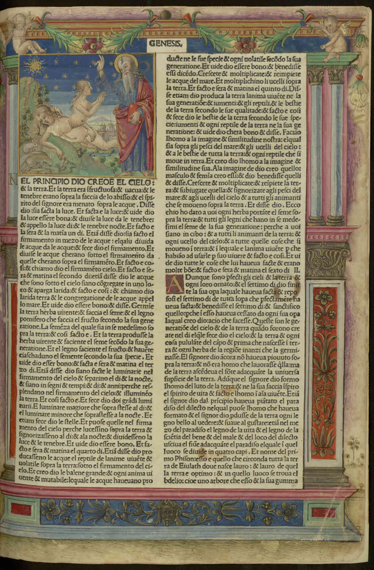 Biblia (italiano). Segue: Leggenda di San Ioseph. - Impresso in Venetia : per el diligente homo Ioanne Rosso vercellese, nel anno del signore MCCCCLXXXVII a di ultimo de octobre. - 452 c. ; a⁸, b-s¹⁰, 얿¹⁰, t-z¹⁰, &¹⁰, A¹⁰, B¹², C-K¹⁰, L²⁰, M-S¹⁰, T-V⁶ ; fol. - Errori nella segnatura di fascicolo. - Cornici e iniziali miniate su foglia d'oro all'inizio di ogni libro. - Cornici e iniziali decorate a penna in ogni carta .